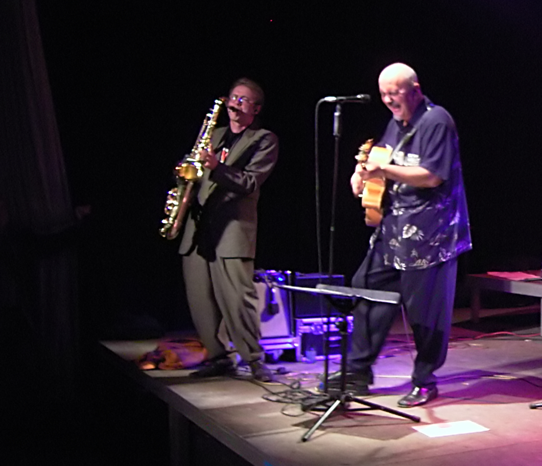 Robert Kretzschmar (Saxophon) und Todor „Toscho“ Todorovic (Gitarre, Gesang) bei einem Konzert der Blues Company in der Lindenbrauerei, Unna